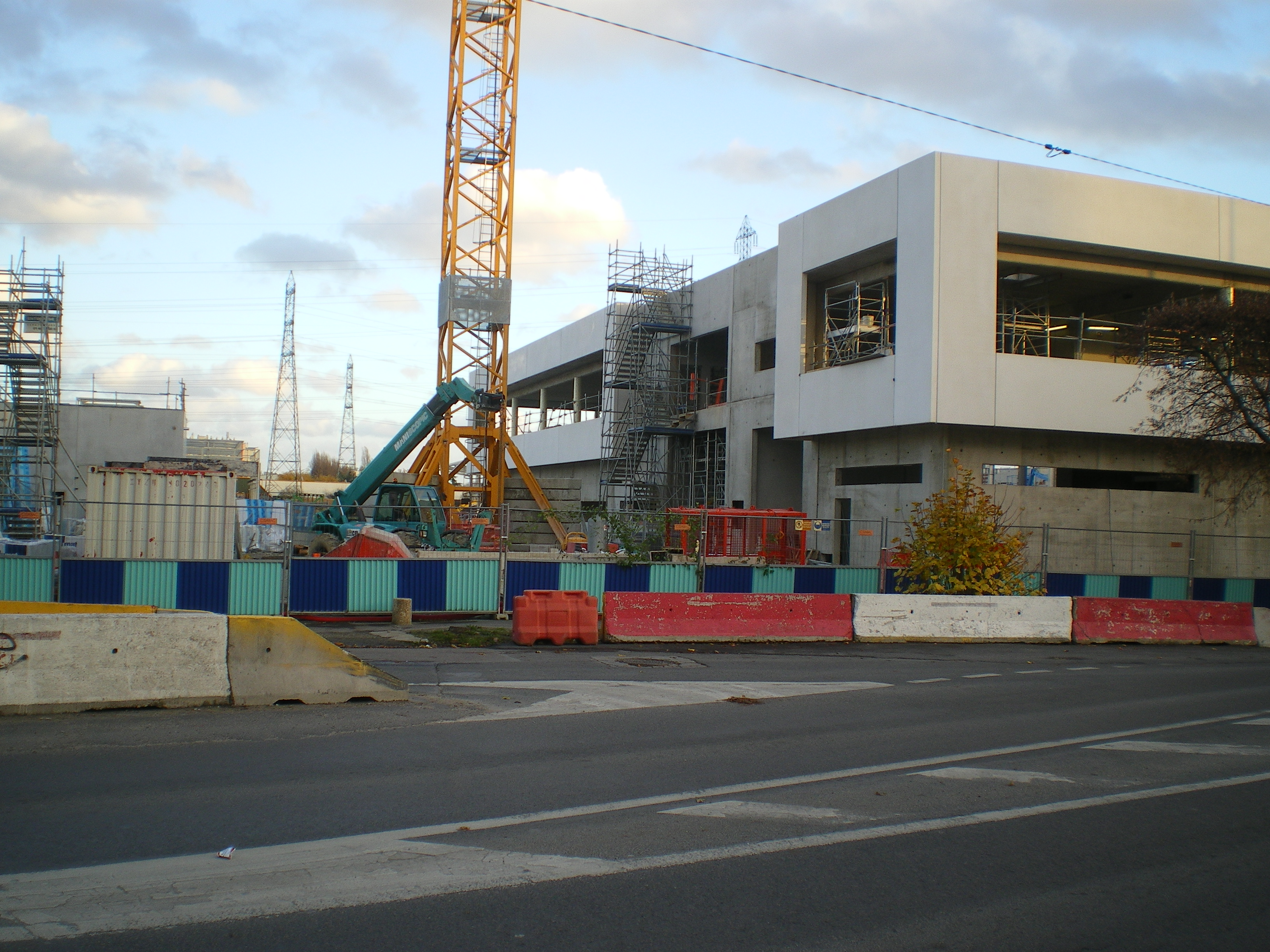 Chantier de l'atelier de remisage des rames du T8